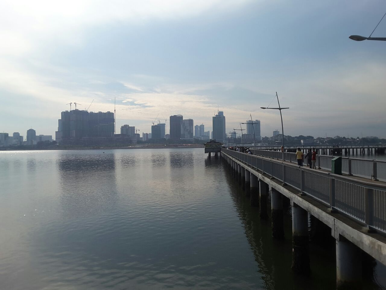 Perairan Woodlands.